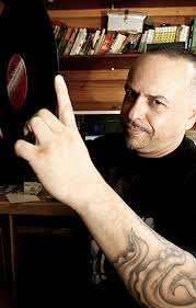 Rodrigo "Pera" Cuadra, conductor de Taberna Metal